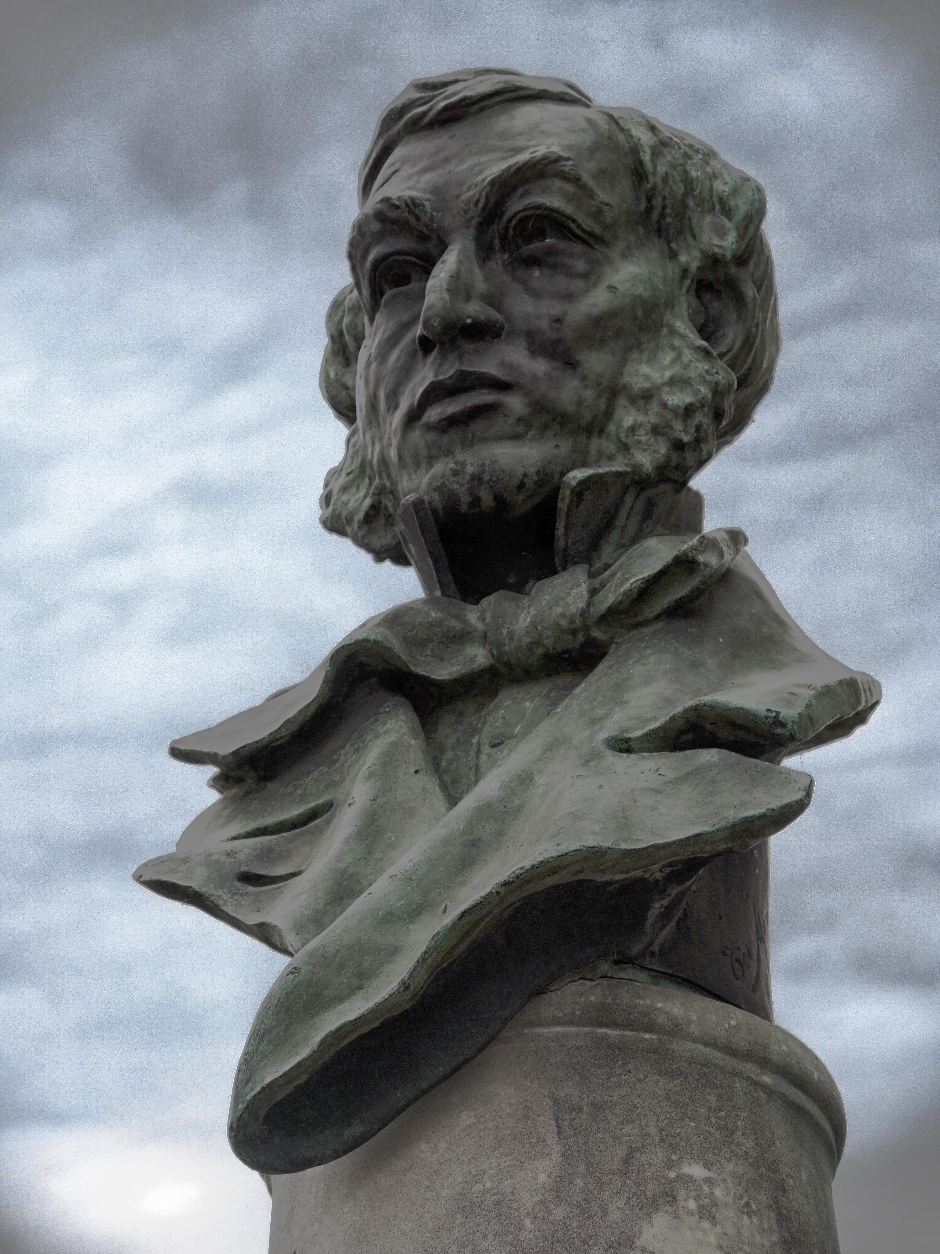 Могила Микаэла Налбандяна (1829 - 1866), революционера - демократа: пос. Мясникован, Ростов-на-Дону, Ростовская область